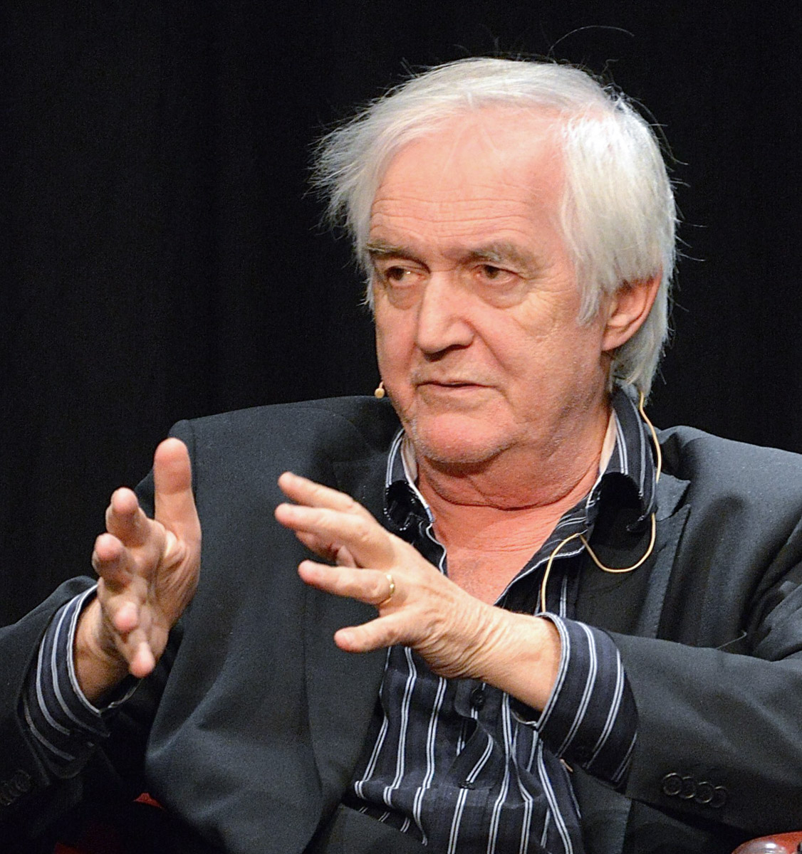 Henning Mankell i ett framträdande under Strindbergsårets sista dag, den 20 januari 2013 i Kulturhuset i Stockholm.